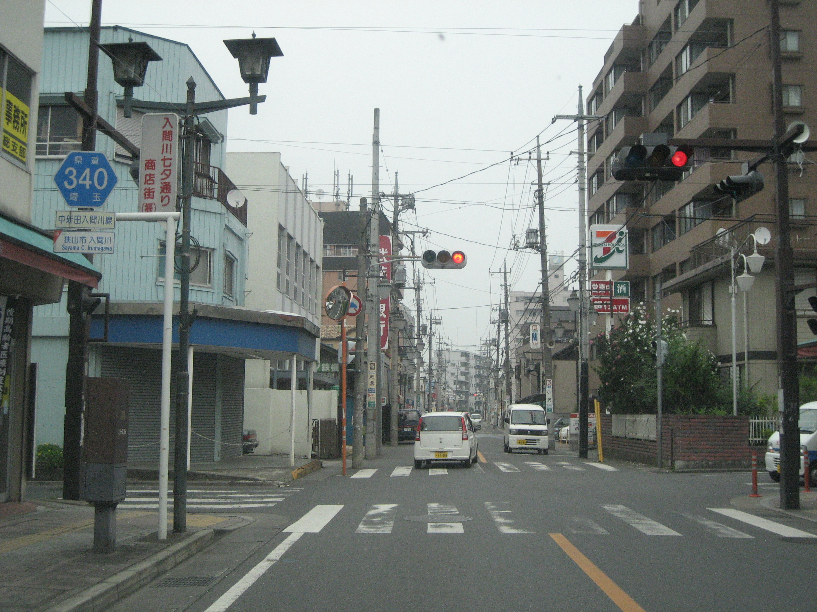 埼玉県道340狭山市内